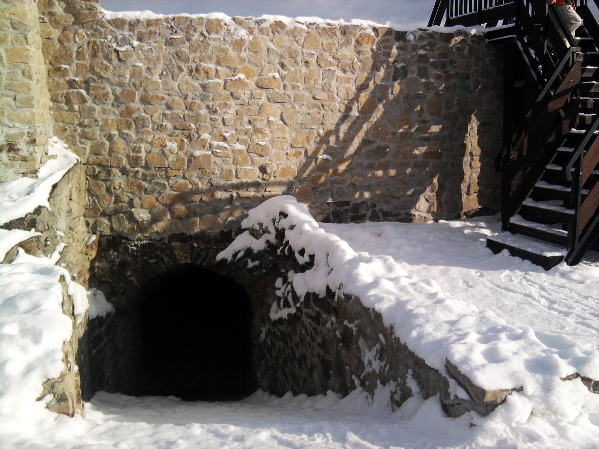 Muszyna - ruiny zamku